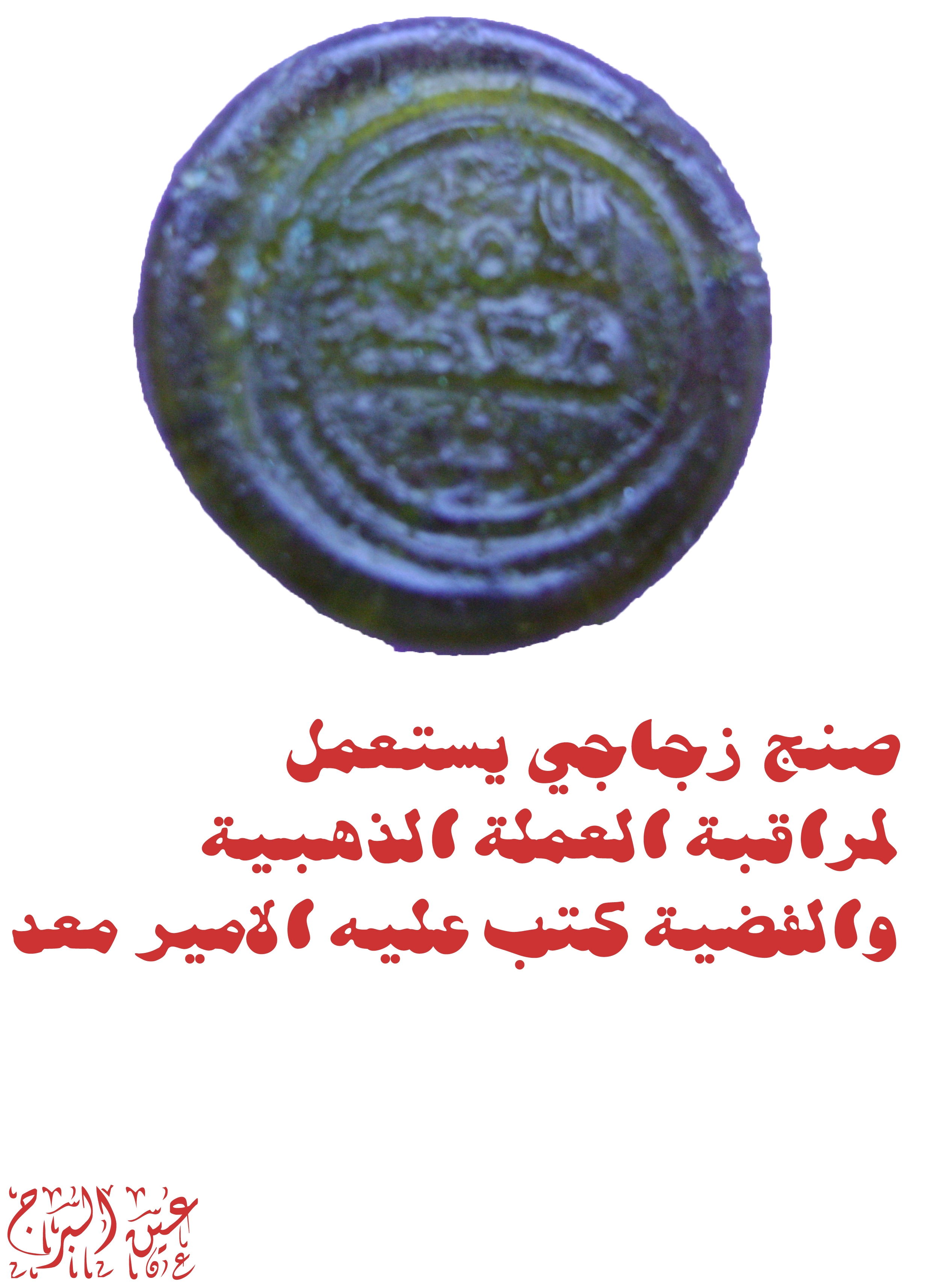 صنج من الزجاج مكتوب عليه بالعربية الامير معد يعود للفترة الفاطمية